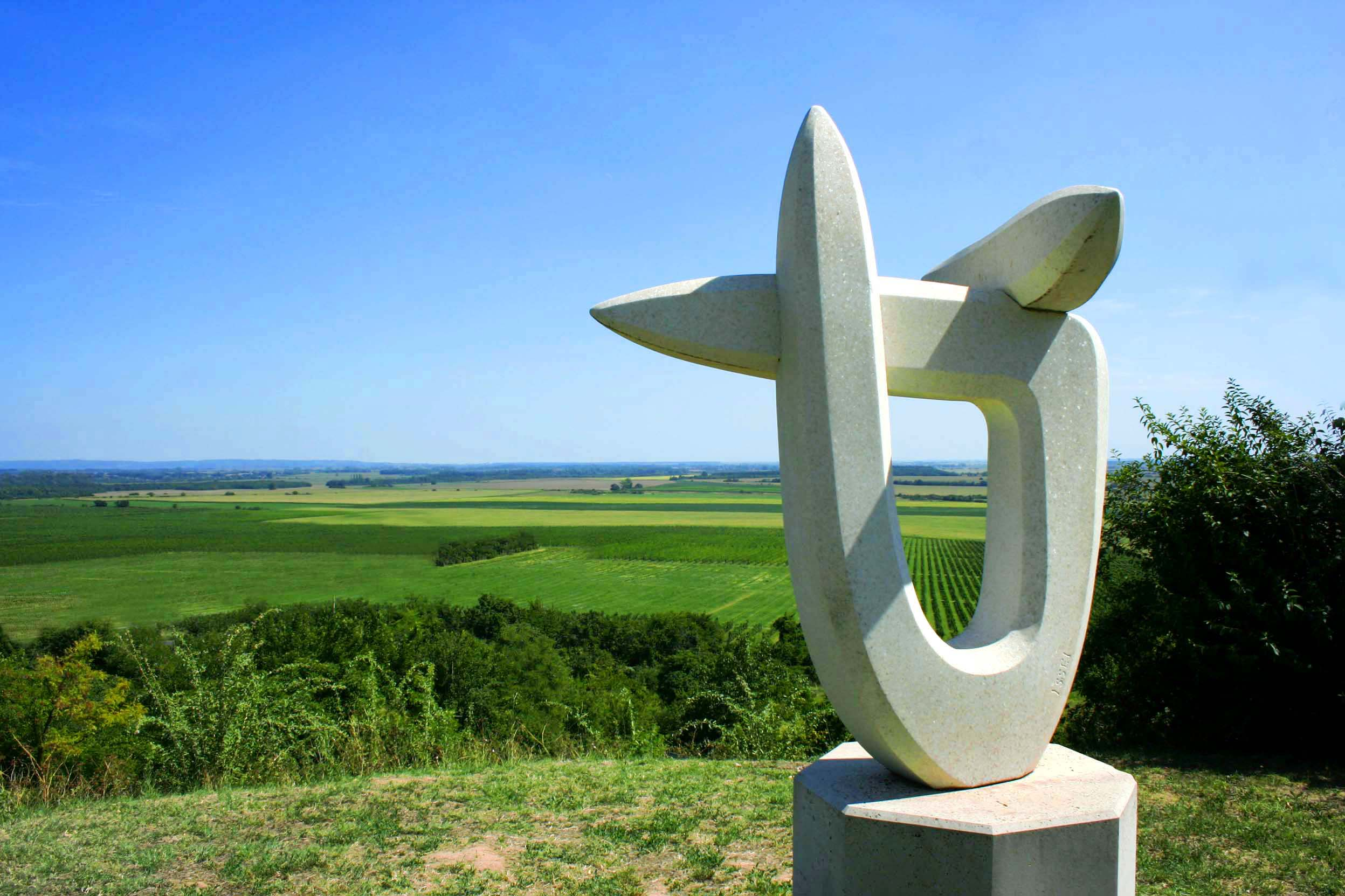 Nagyharsány szoborpark panoráma